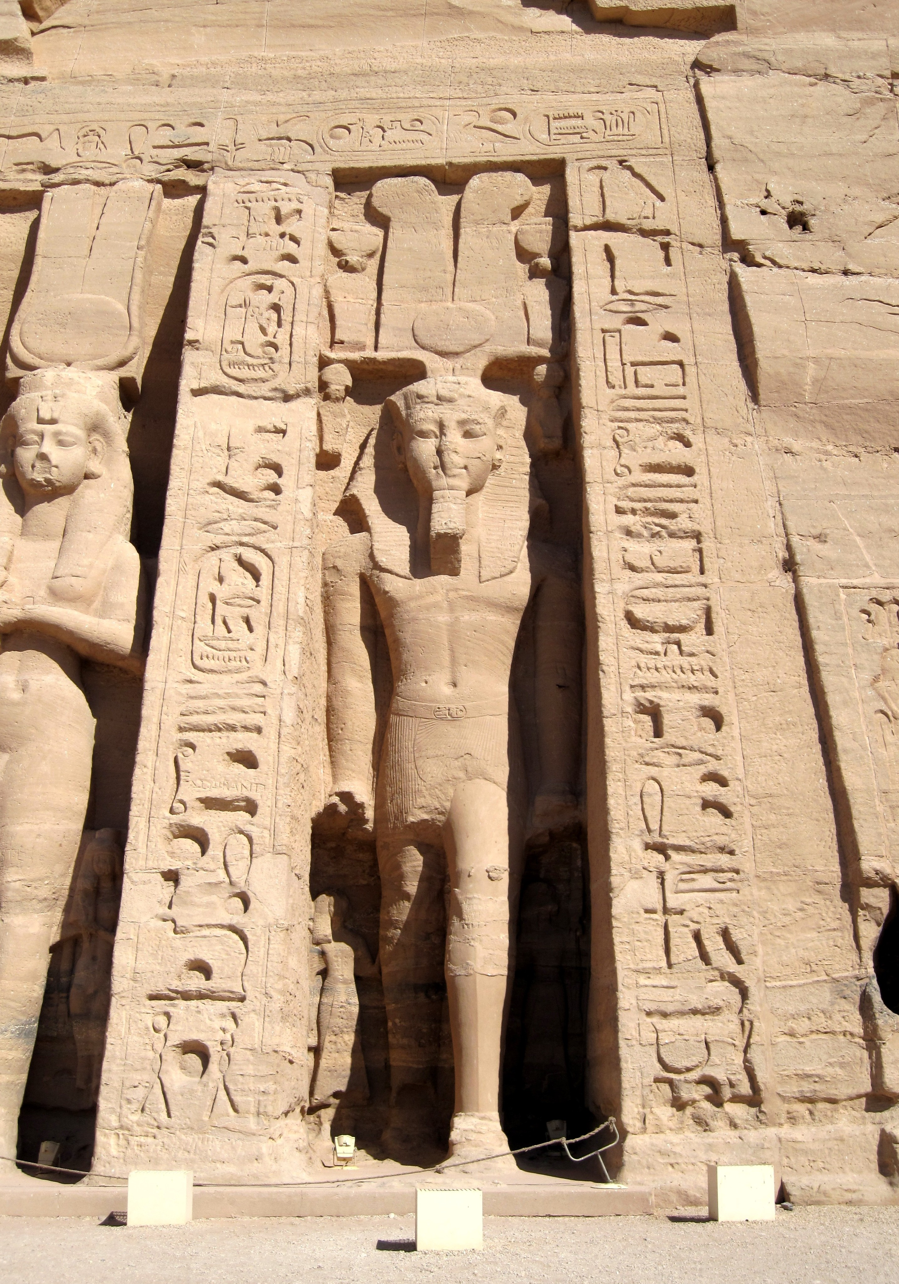 Rechte der drei rechtsseitigen Skulpturen des kleinen Tempels von Abu Simbel (Hathor-Tempel oder Tempel der Nefertari), Ägypten